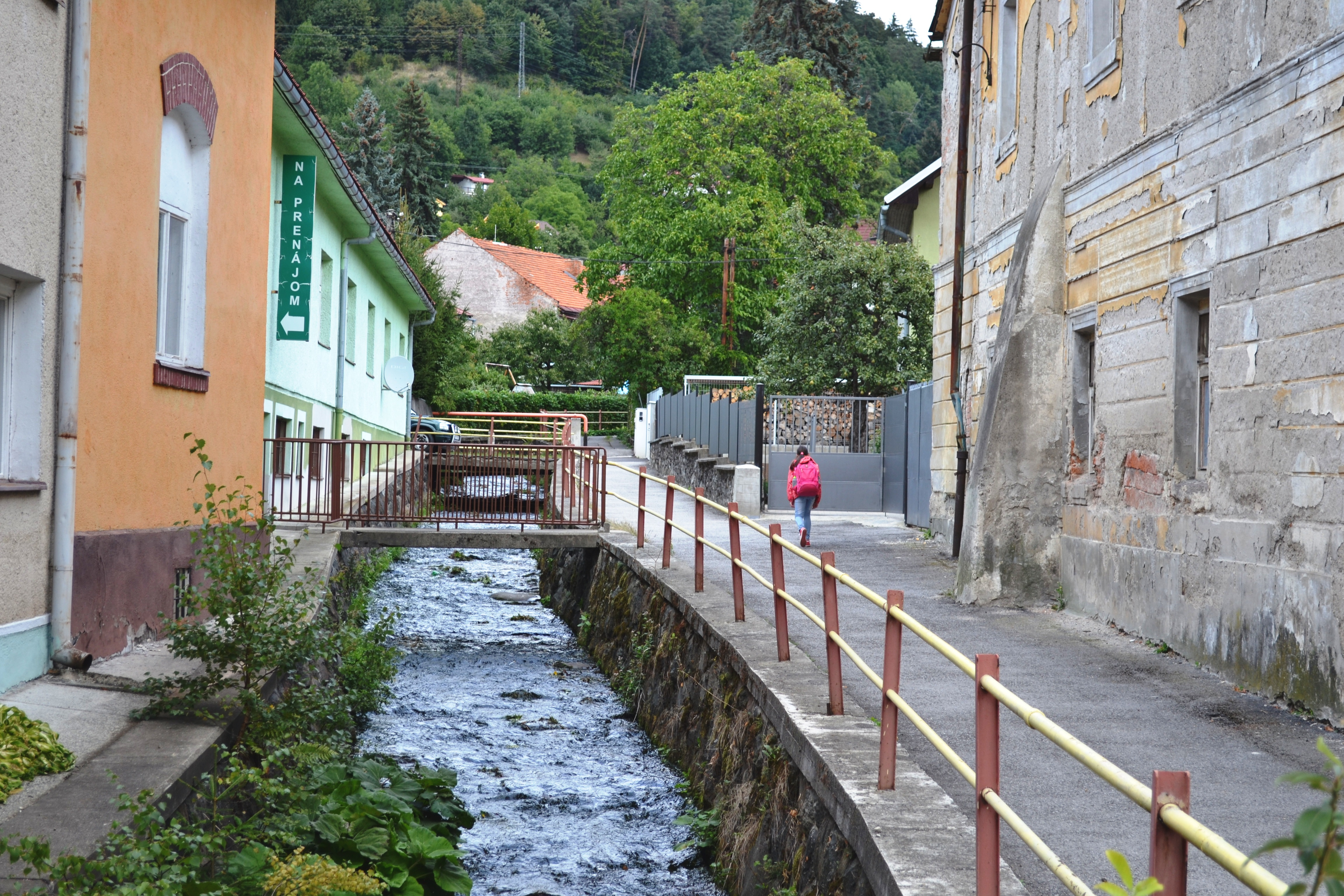 Potok Skalka, prítok Kremnického potoka, pretekajúci Kremnicou